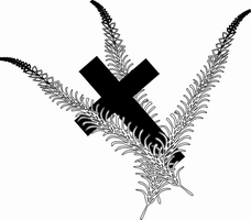 Symbolika stosowana w nekrologach zmarłych chrześcijan. Autor grafiki: Waldemar Zboralski